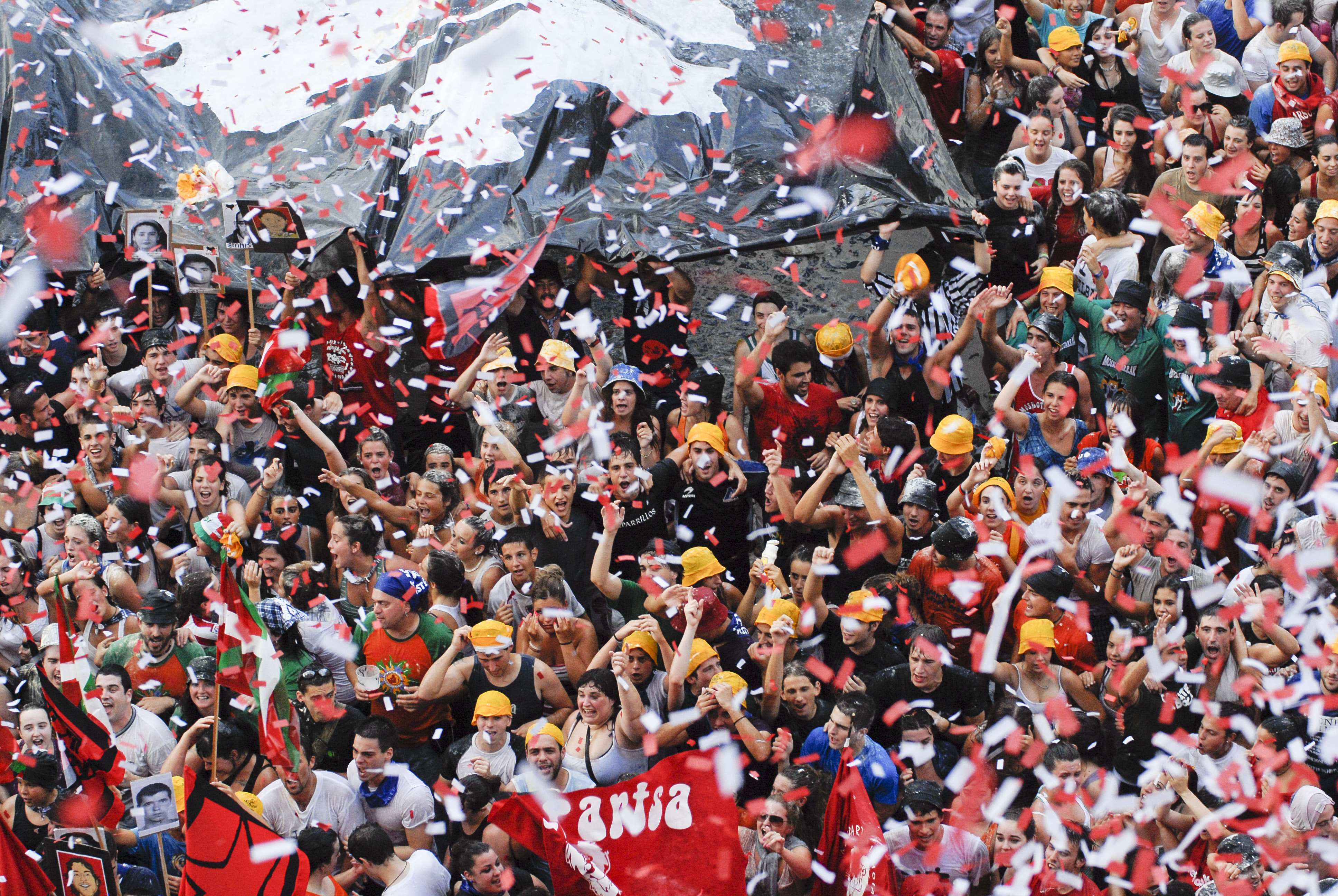 Larunbata20-72